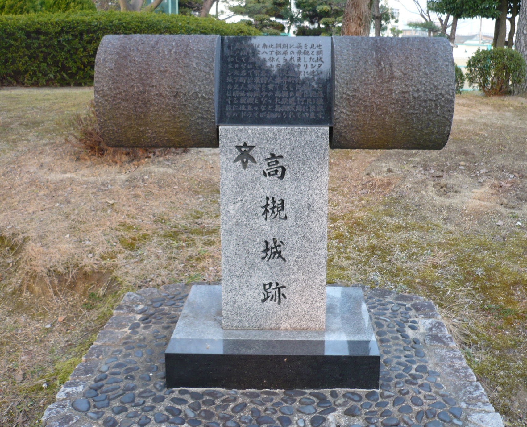 高槻城石碑